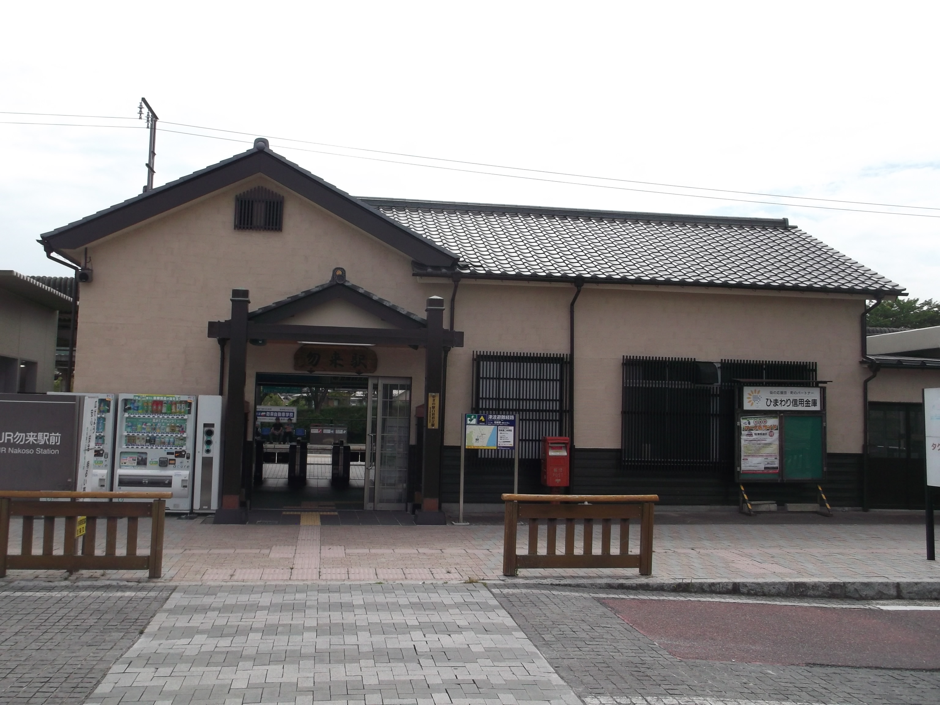 JR常磐線 勿来駅駅舎